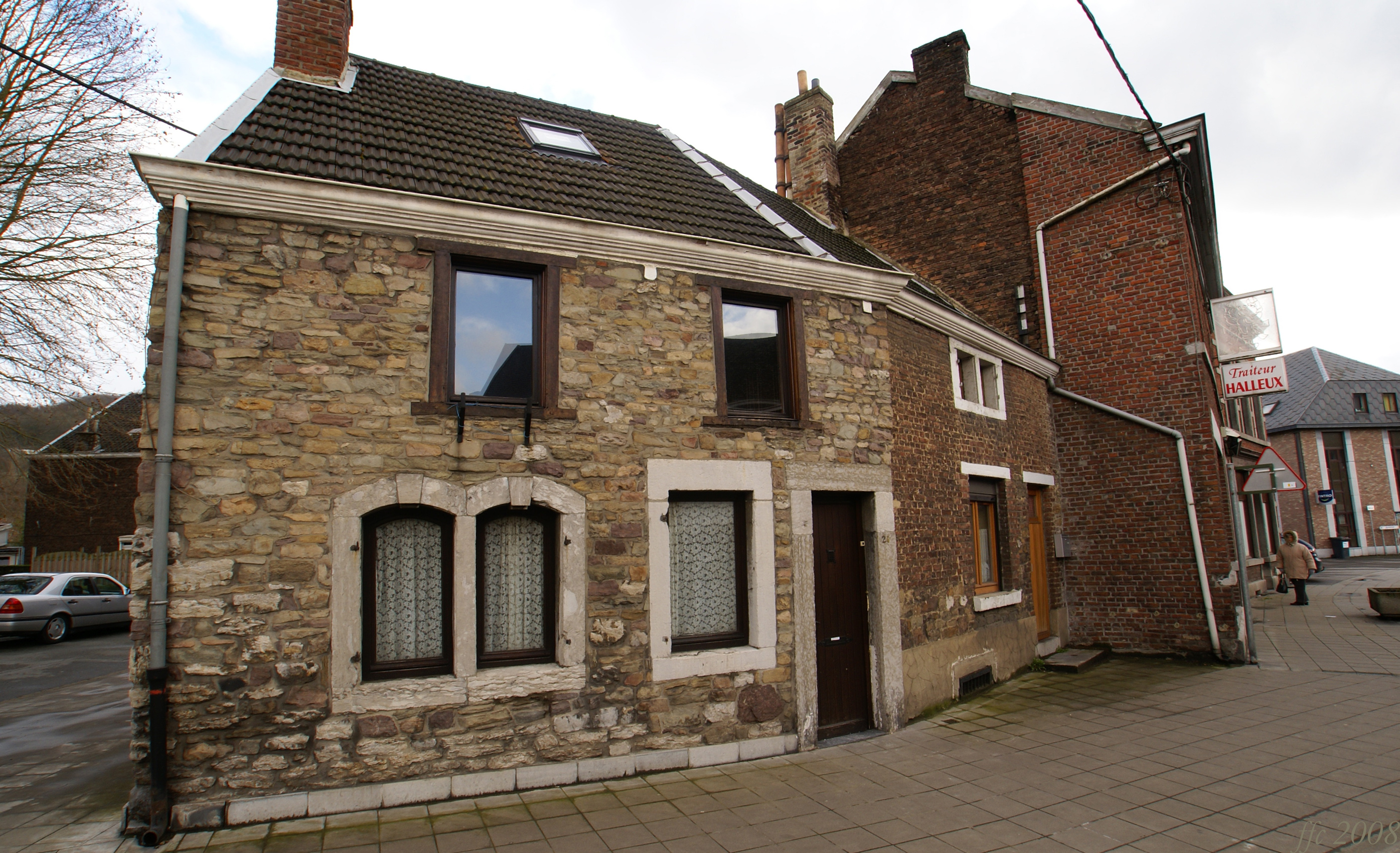 Vaux-sous-Chèvremont (Belgium) Rue des Combattants